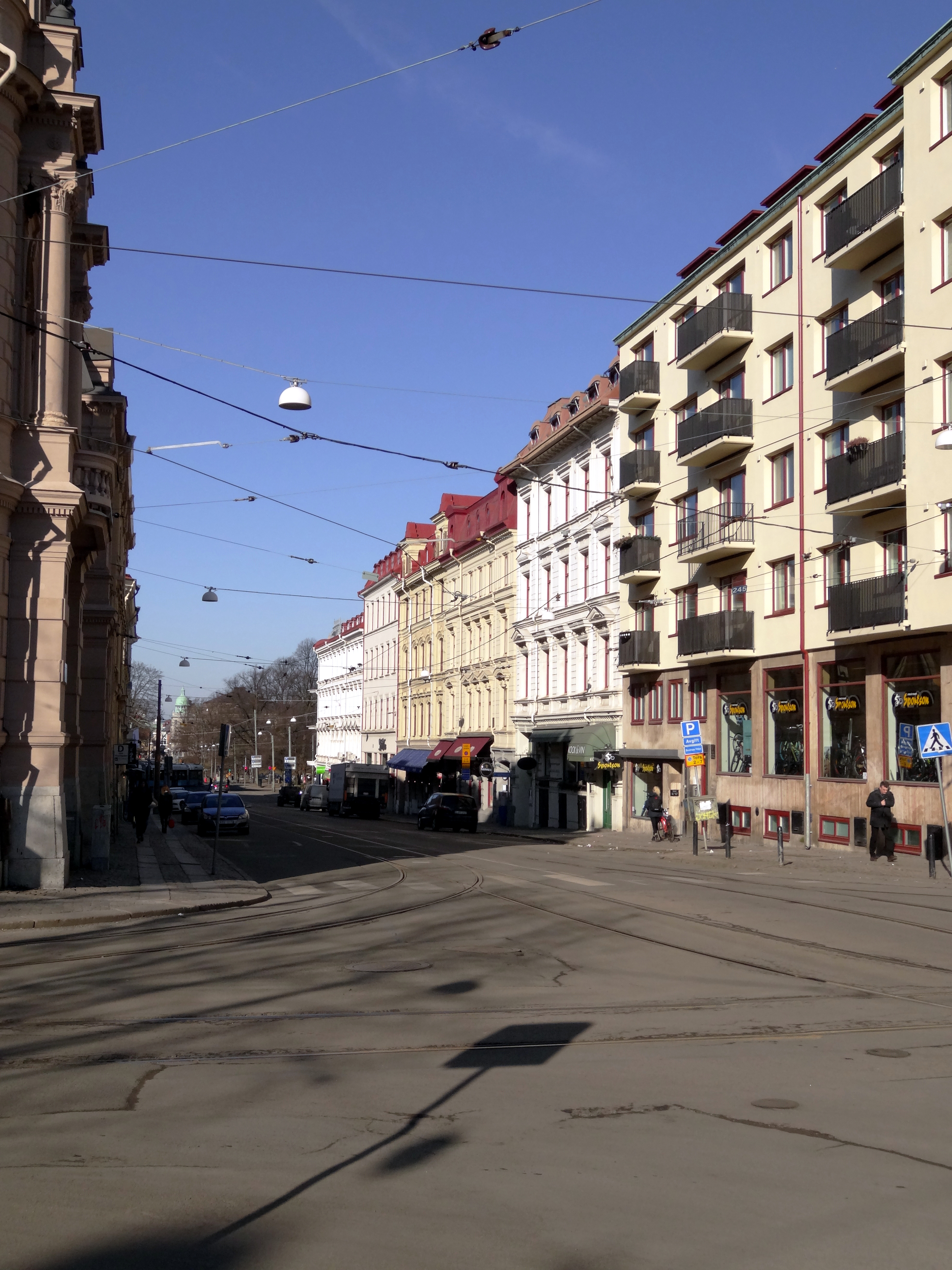 Viktoriagatan i Göteborg. Vy norrut från korsningen med Vasagatan.